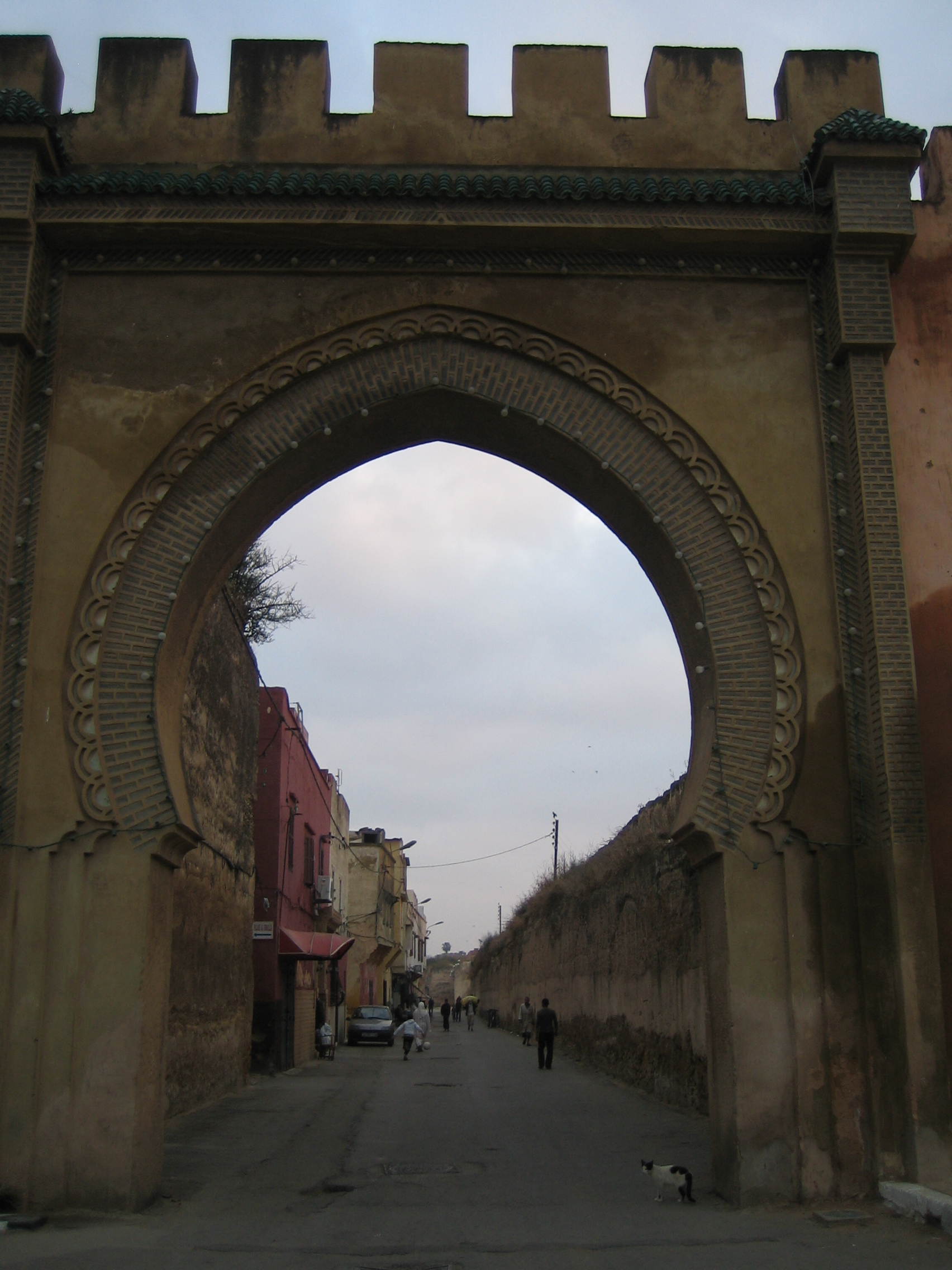 Bab Belqari à Meknès (Maroc)